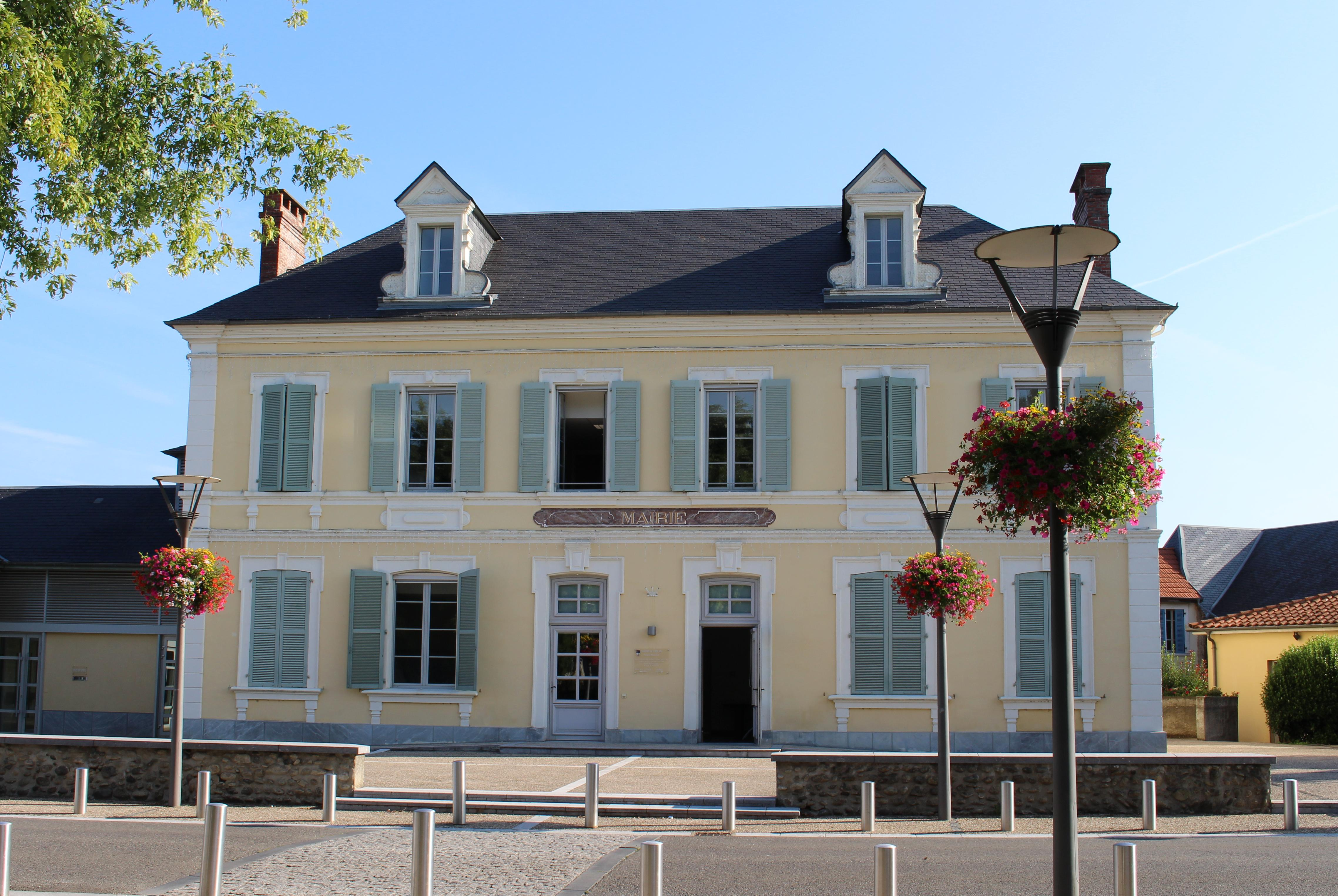 Mairie de Juillan (Hautes-Pyrénées)